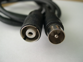 Cavo d'antenna